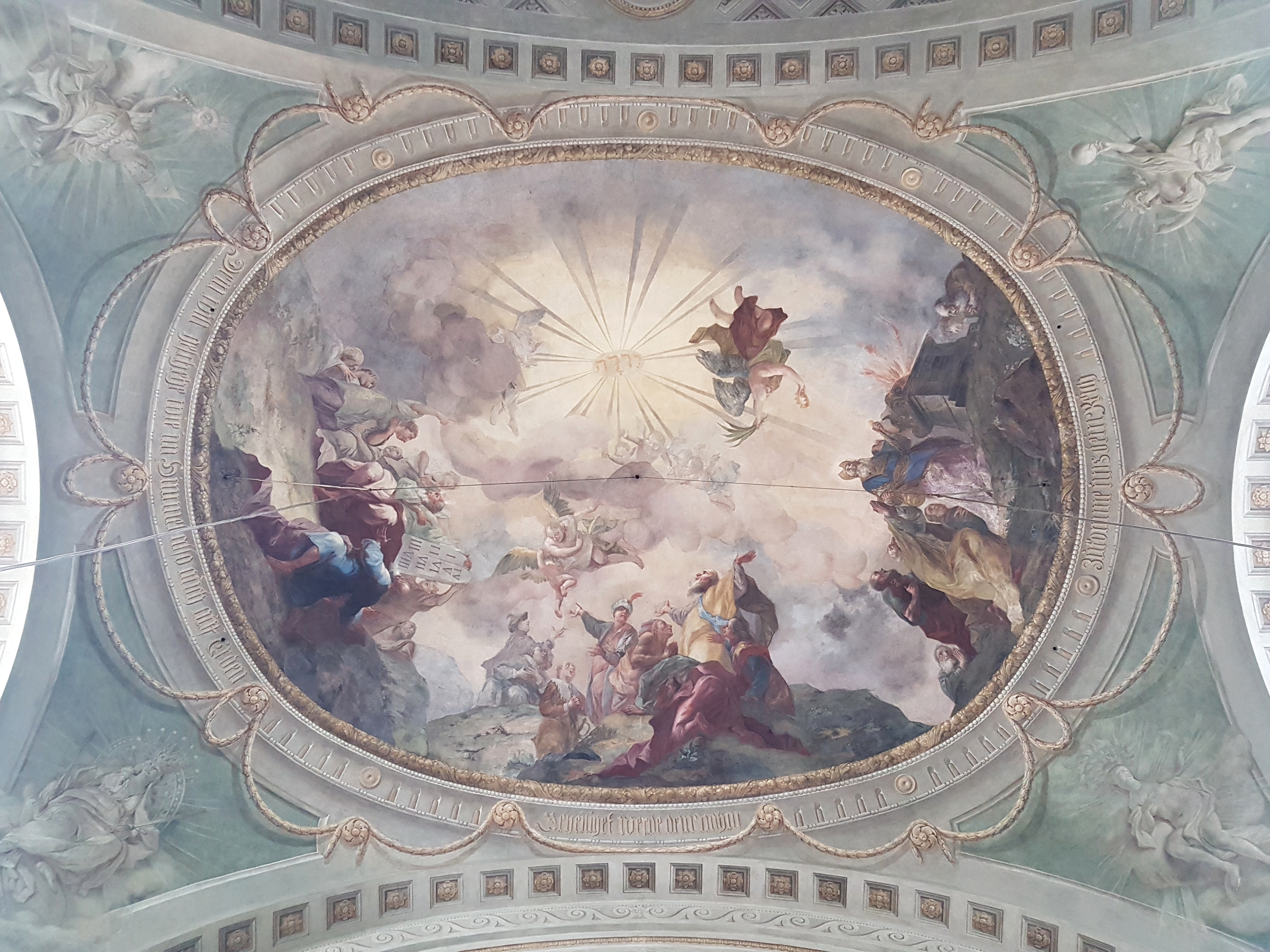 Wien-Alsergrund, Pfarrkirche Vierzehn Nothelfer Lichtental, hinteres Deckenfresko Die VaterUnser-Fürbitten IV-VII (1771/72) von Franz Zoller.